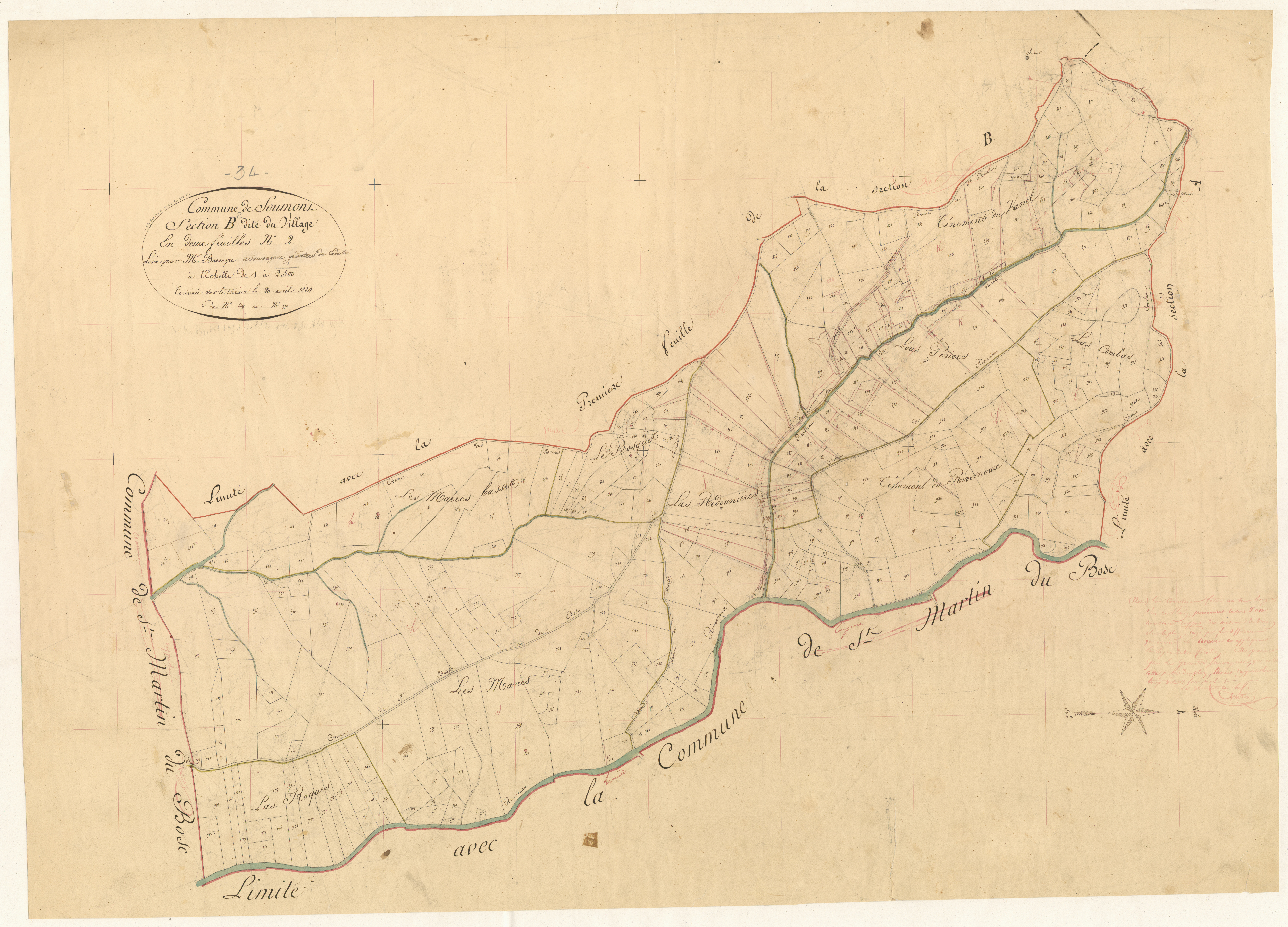 Soumont. - Cadastre napoléonien : section B2 du Village.